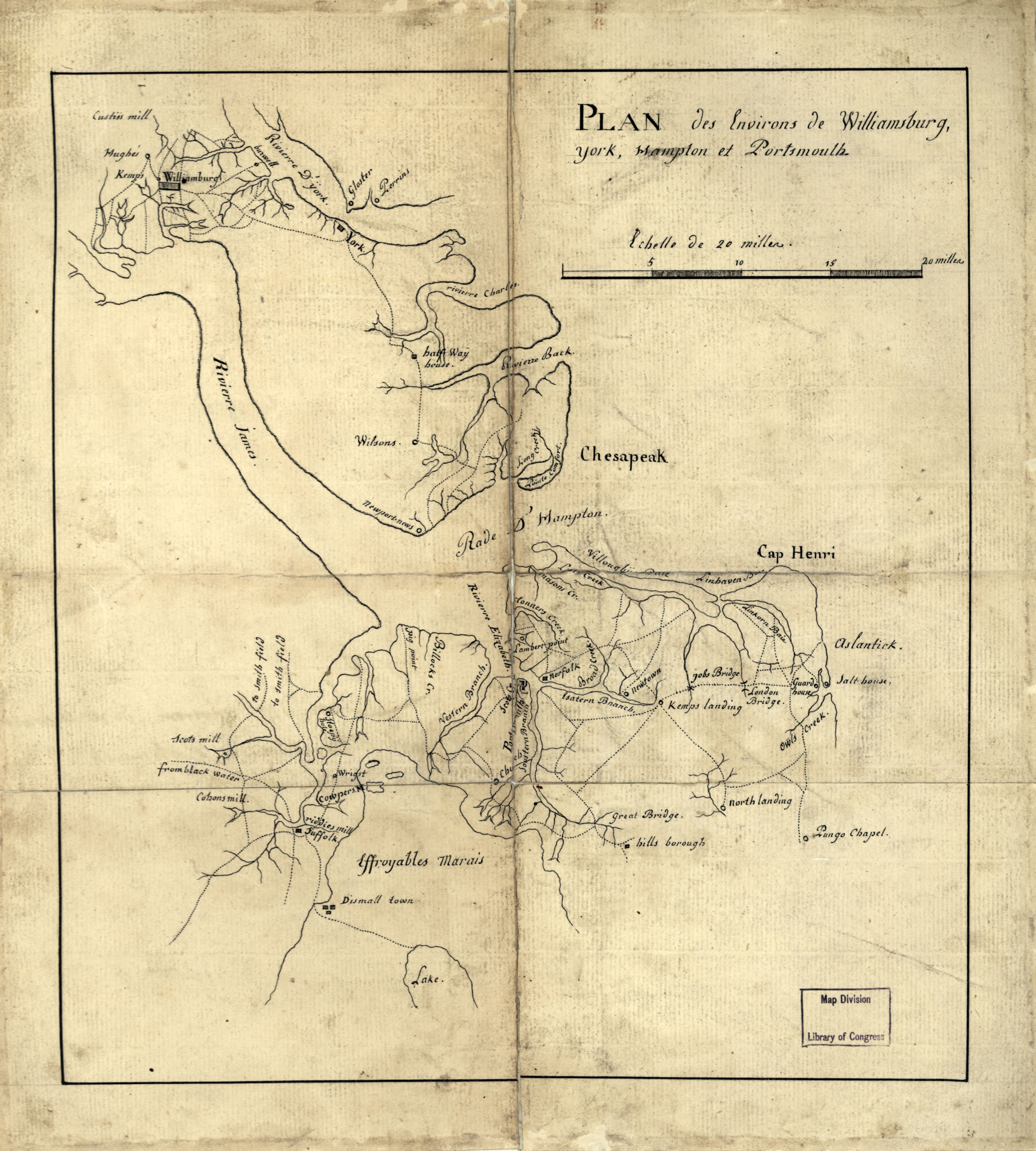 Plan des environs de Williamsburg, York, Hampton, et Portsmouth